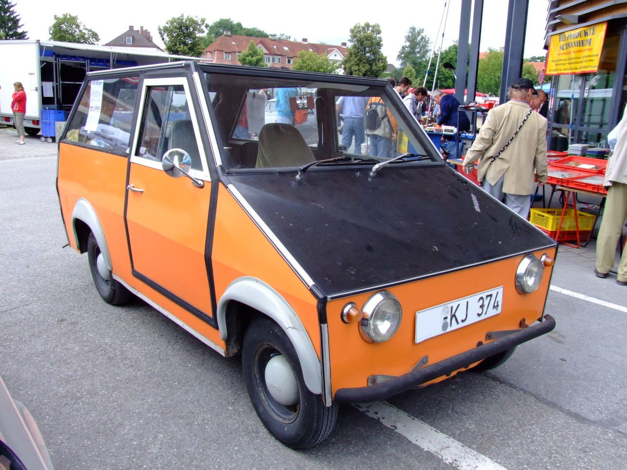 Quelle: selbst fotografiert, 07/2007 Fotograf: Späth Chr.